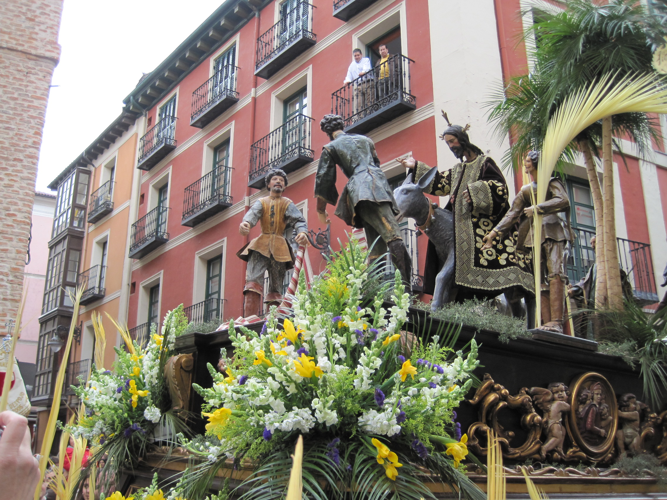 Vista parcial del paso La Entrada Triunfal de Jesús en Jerusalén. Cofradía Penitencial de la Santa Vera Cruz, Valladolid (España).